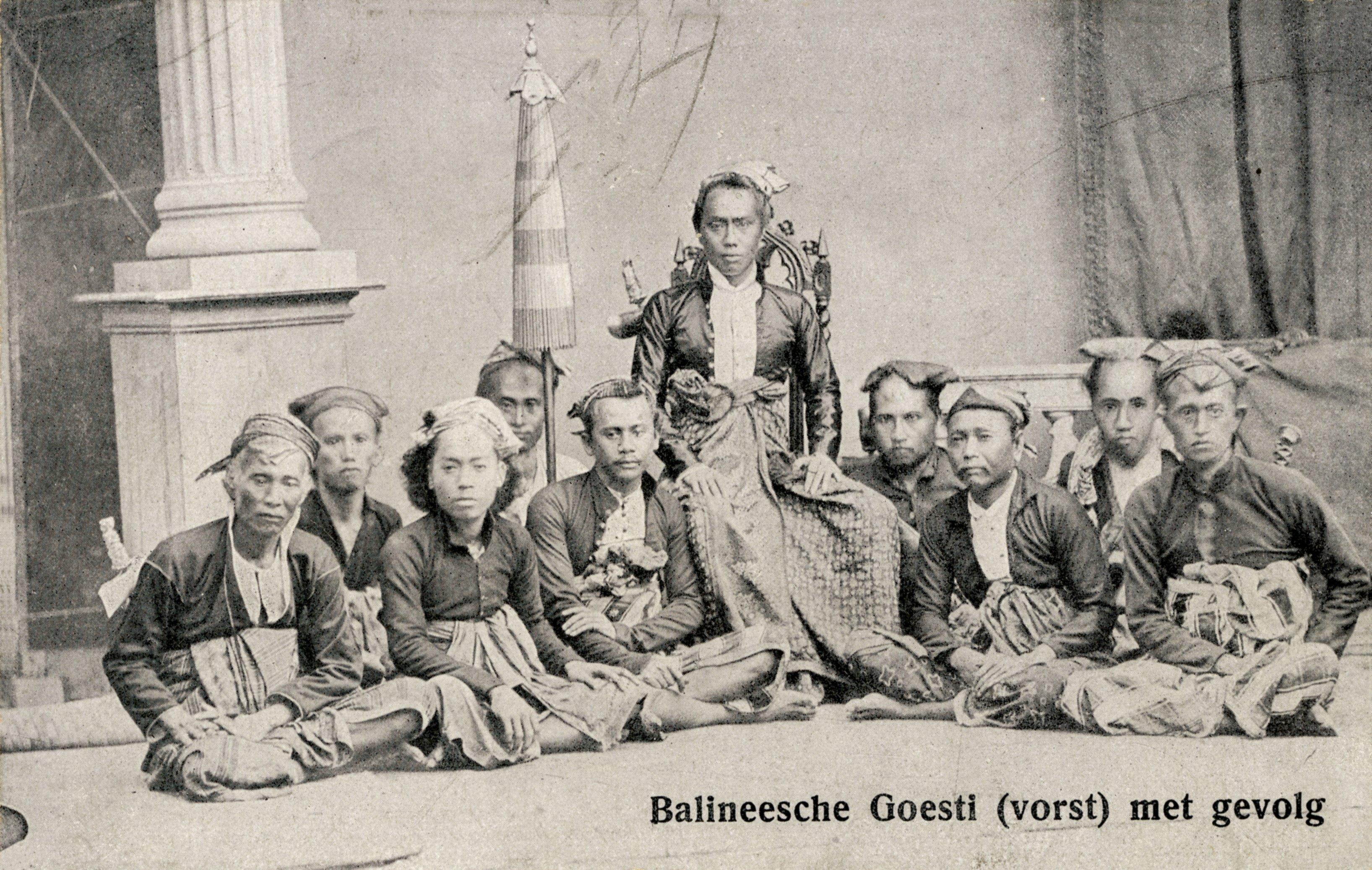 Goesti Ngoerah Ketoet Djilantik, radja van Boeleleng, met zijn gevolg te Buitenzorg (Bogor) tijdens zijn bezoek aan gouverneur-generaal L.A.J.W. Sloet van de Beele. Image code 31350. Bali, Buleleng, indigenous administration, Indonesia, Jakarta Raya. Foto. Offset. Uitgave: Tio Tek Hong, Weltevreden Special Depot of Java postcards. Prentbriefkaart is van later datum, circa 1925. Ook aanwezig als foto onder signatuur 3512. Foto gemaakt in de studio van Woodbury & Page te Batavia. Size 9x14cm. Copies 1400158, 3512